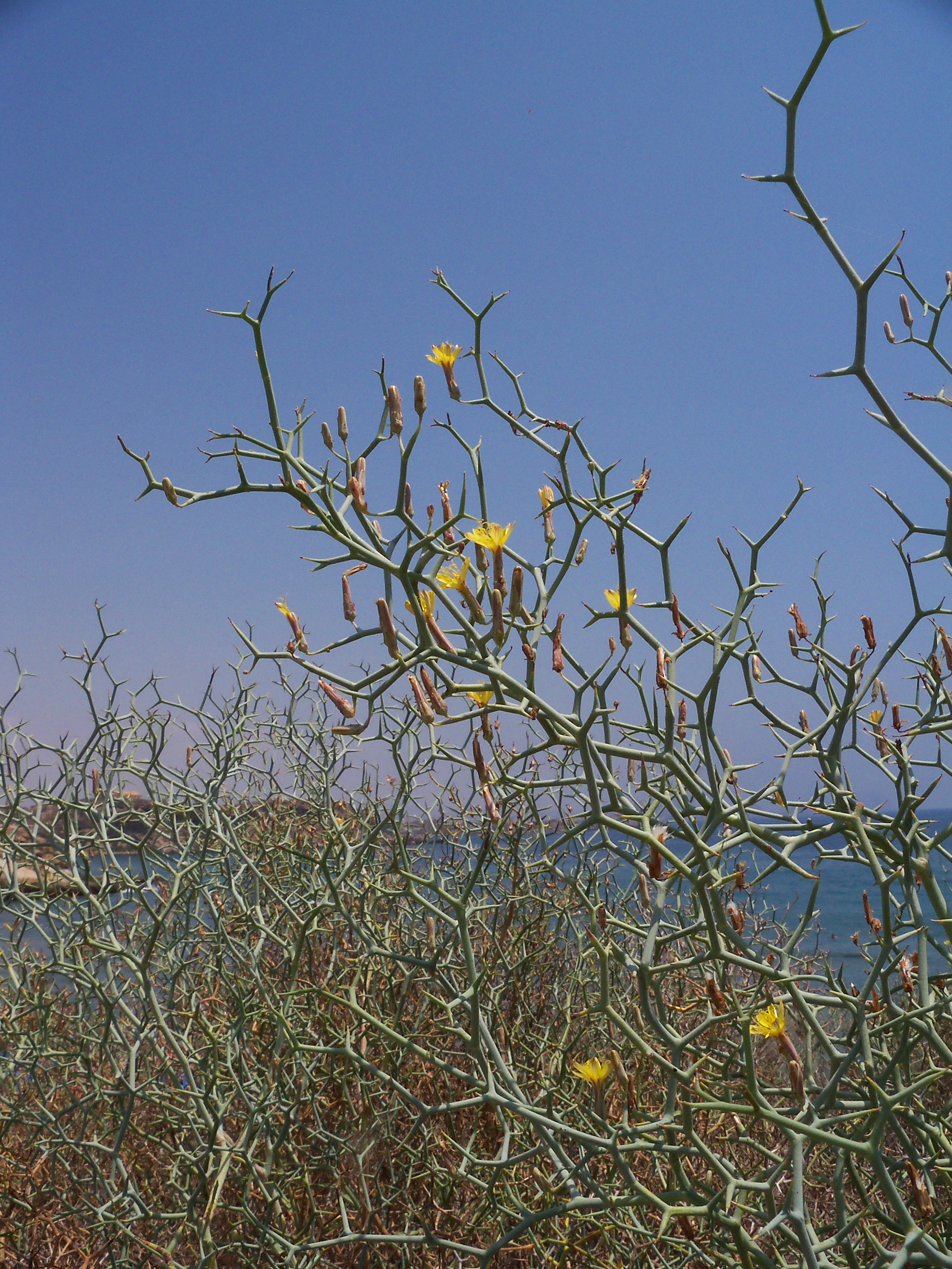 Launaea arborescens (Aulaga): Aspecto general en su hábitat - Playa de la Carolina (Cuatro Calas), Águilas (Murcia, España)